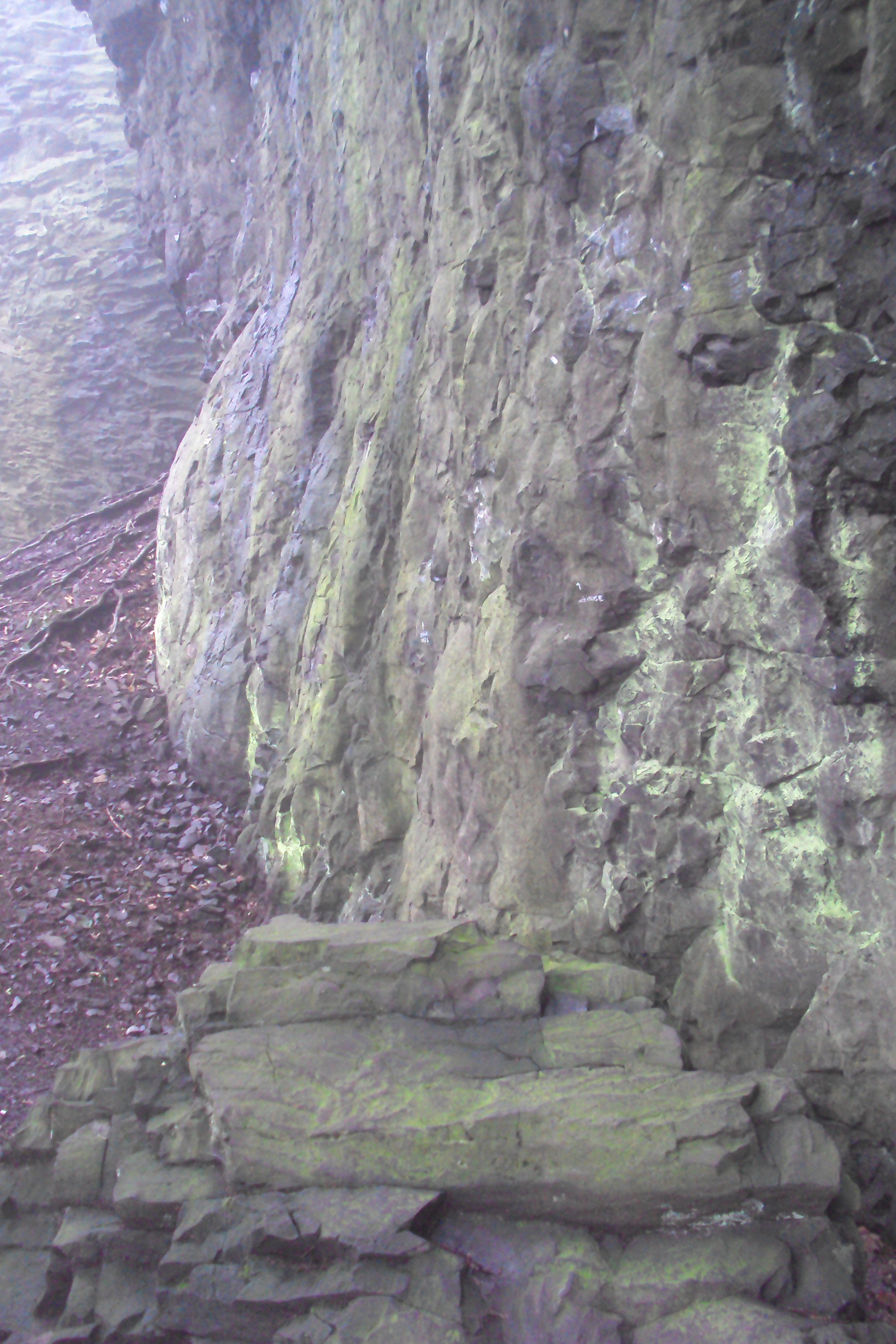 Skály pod vrcholem, pro mlhu jen detail